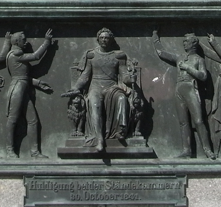 Ausschnitt aus der Relieftafel „Huldigung beider Ständekammern am 30. October 1841“ an der Jubiläumssäule auf dem Schlossplatz in Stuttgart. Mitte: König Wilhelm I. von Württemberg, rechts: Karl Georg von Wächter, Präsident der Zweiten Kammer des Landtags, links: Fürst Ernst zu Hohenlohe-Langenburg, Präsident der Ersten Kammer des Landtags.